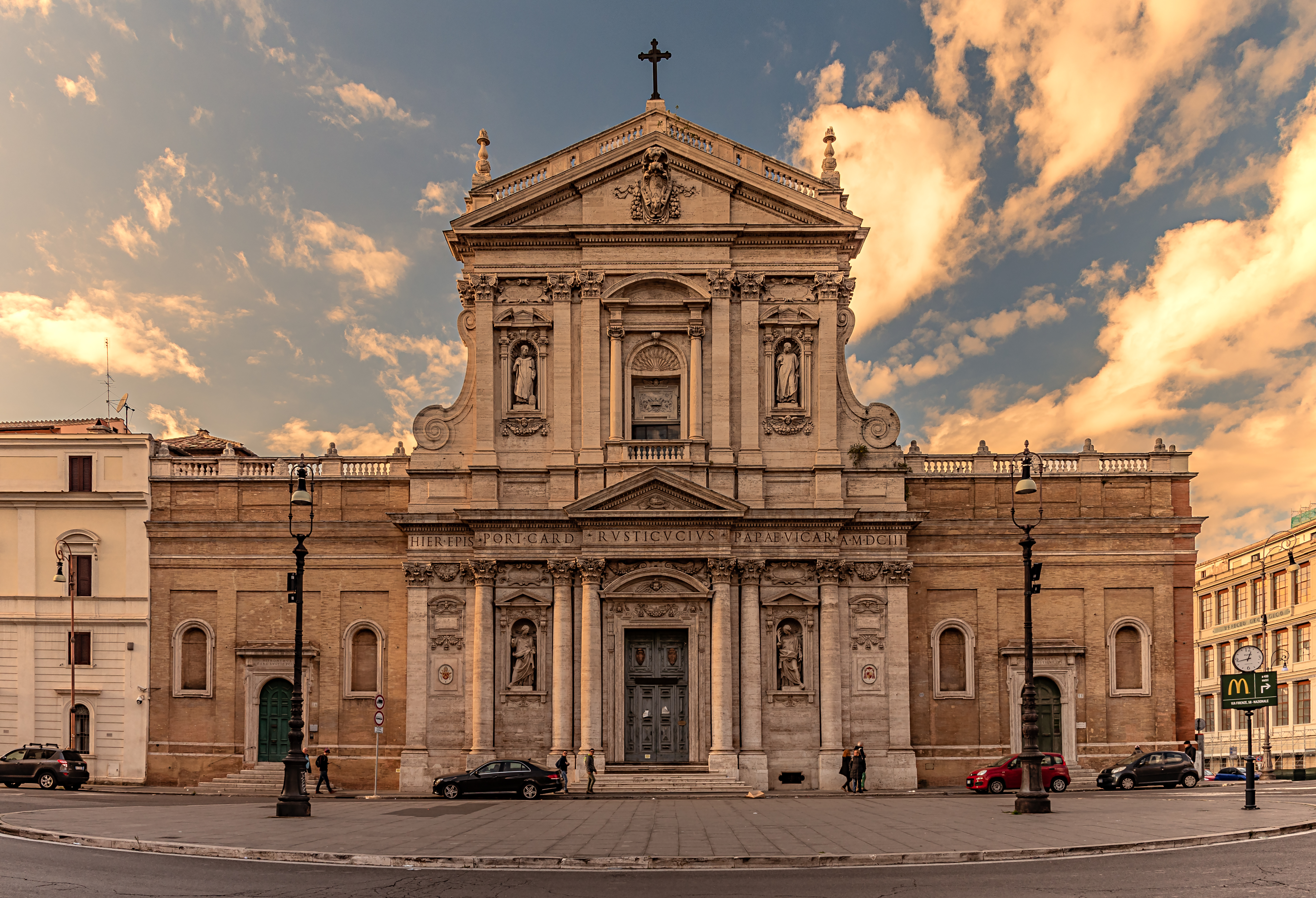 Frontansicht der Santa Susanna alle Terme di Diocleziano in Rom